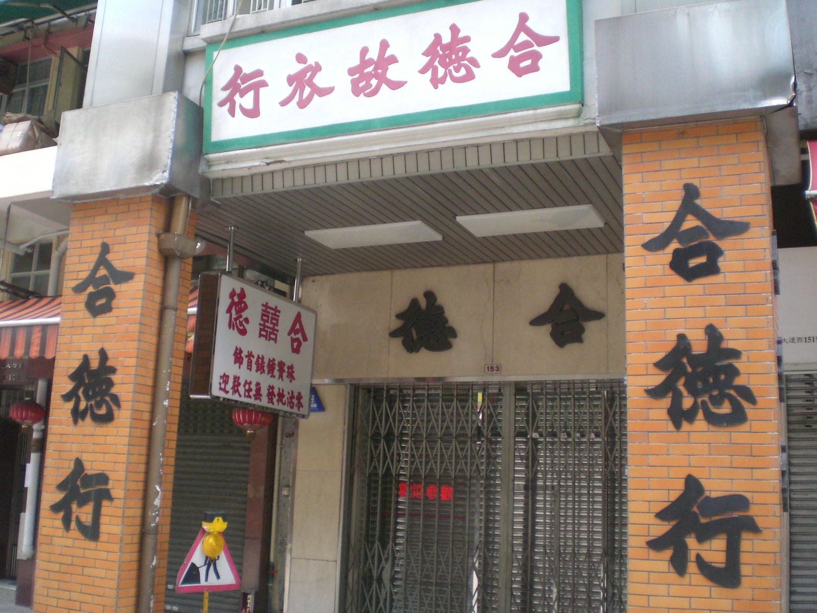 中文（香港）: 西營盤德輔道西141號近西營盤賽馬會分科診所旁zh:成衣故衣二手市場遺址,現在已轉業.